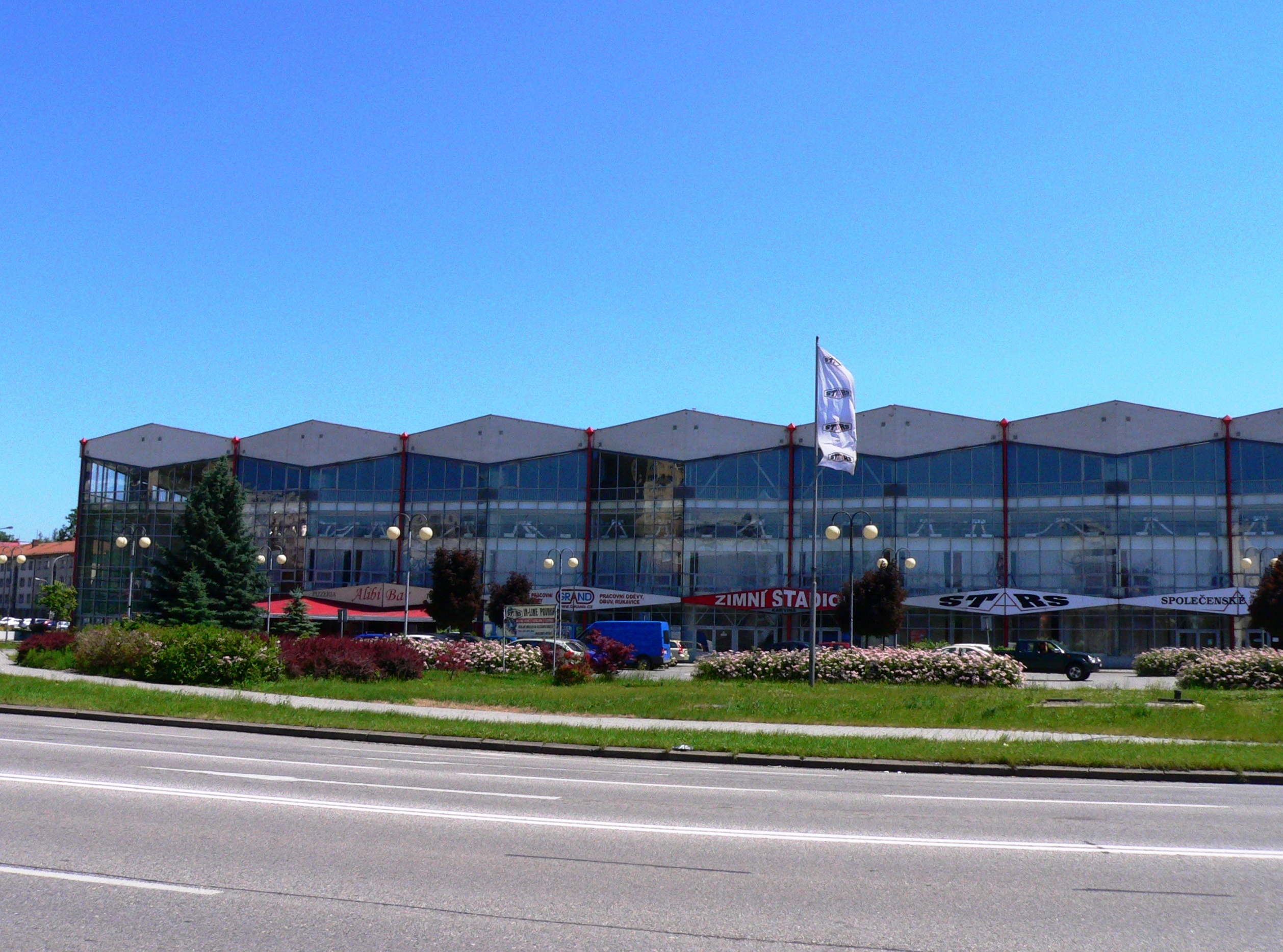 Zimní stadión v Karviné.